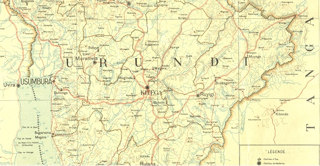 Kiswahili: Sehemu ya ramani ya kikoloni ya Ruanda-Urundi, inahitajika kuonyesha matumizi ya umbo la jina "Urundi"